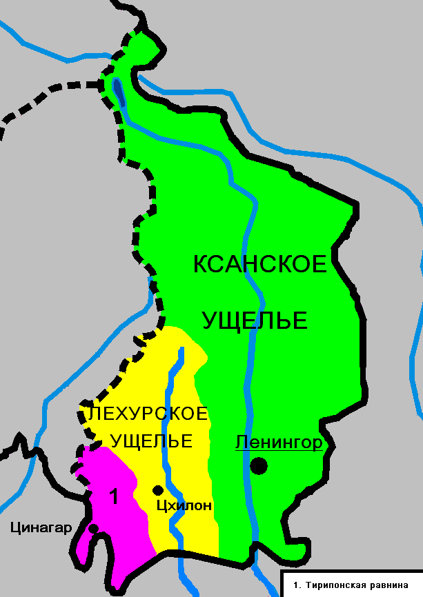 Физико-географическое районирование Ленингорского района